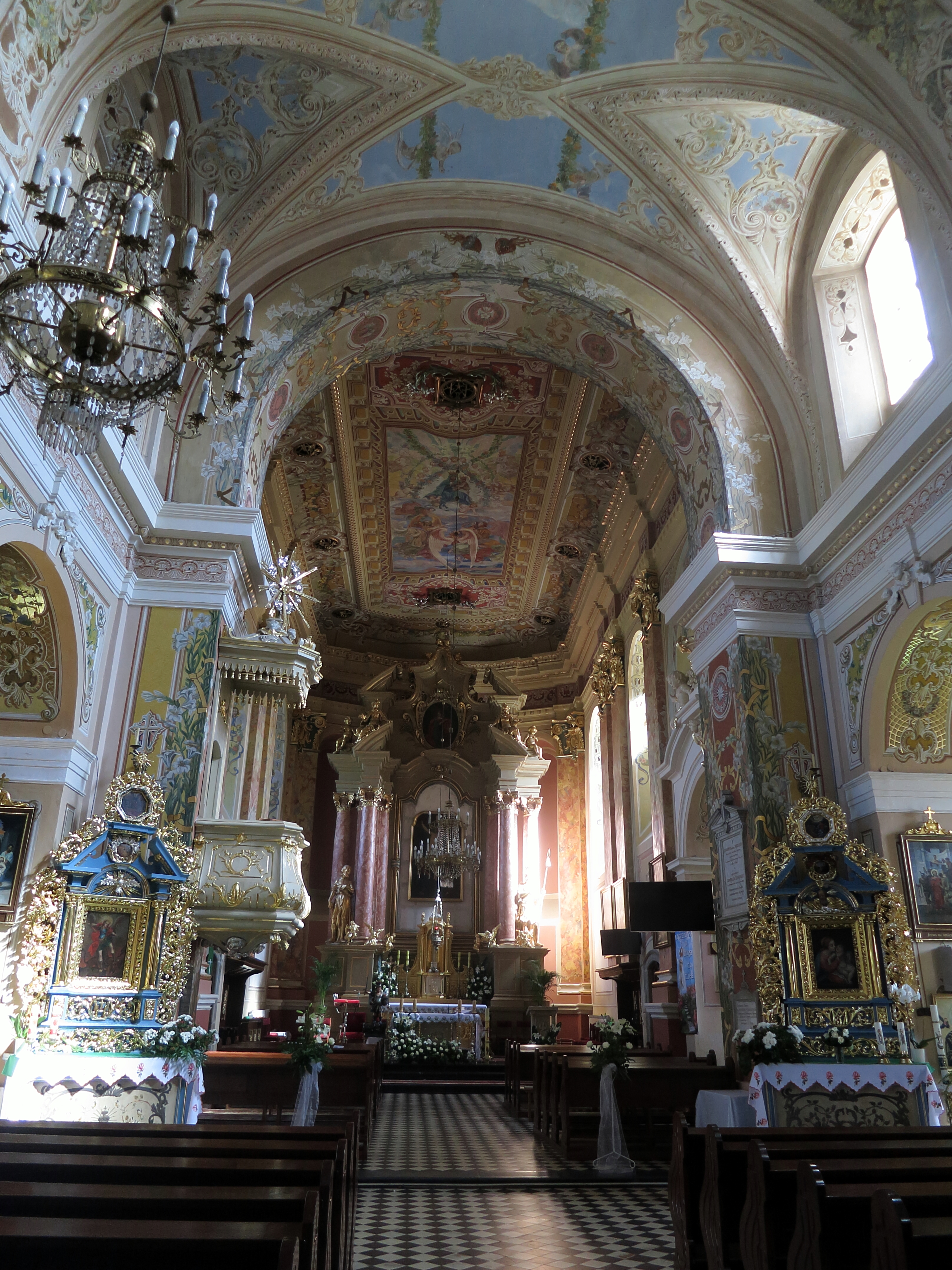 Tyczyn, zespół kościoła par. p.w. Wniebowzięcia NMP i św. Katarzyny, XVIII